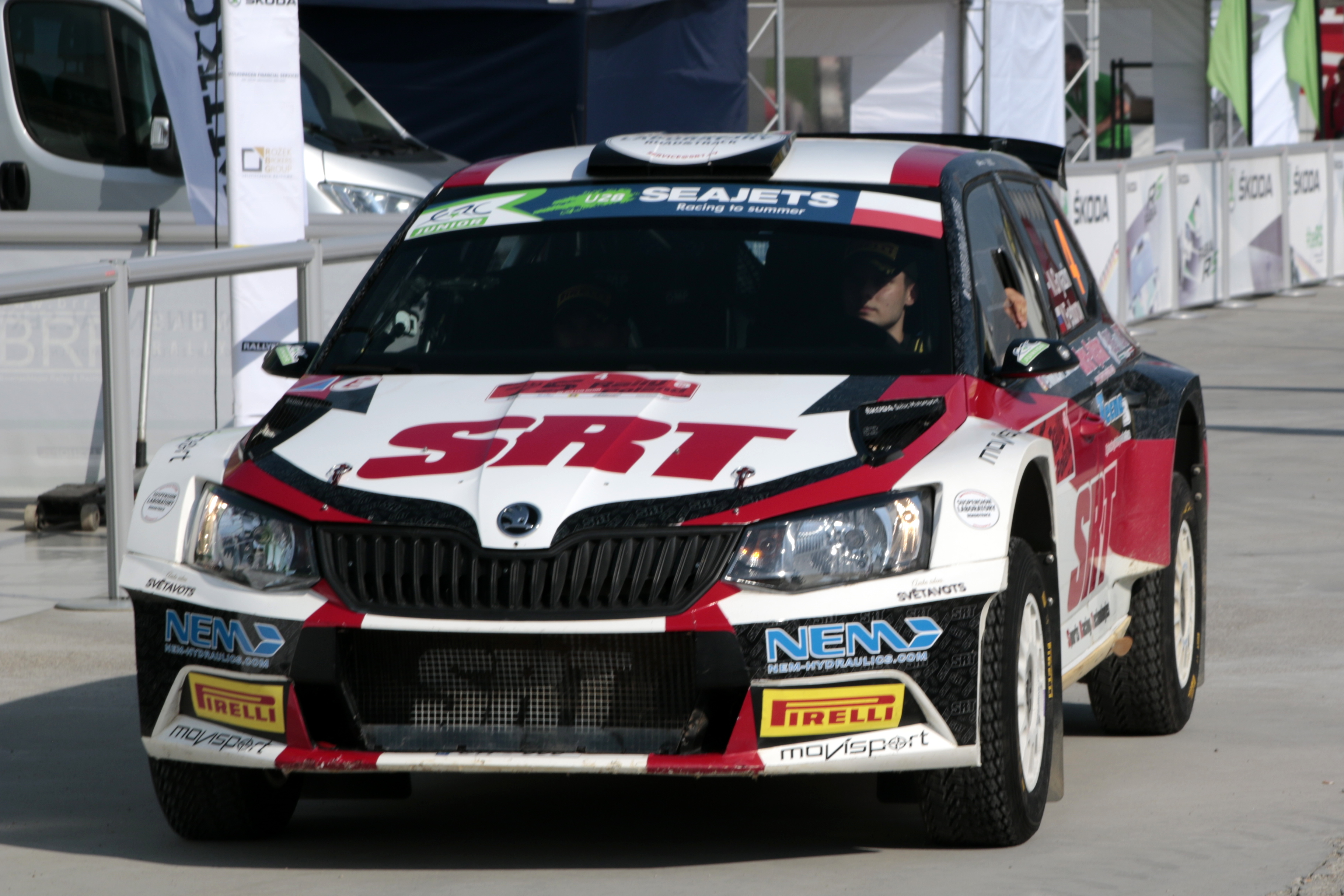 Rajd Polski - 2018 Nikolay Gryazin